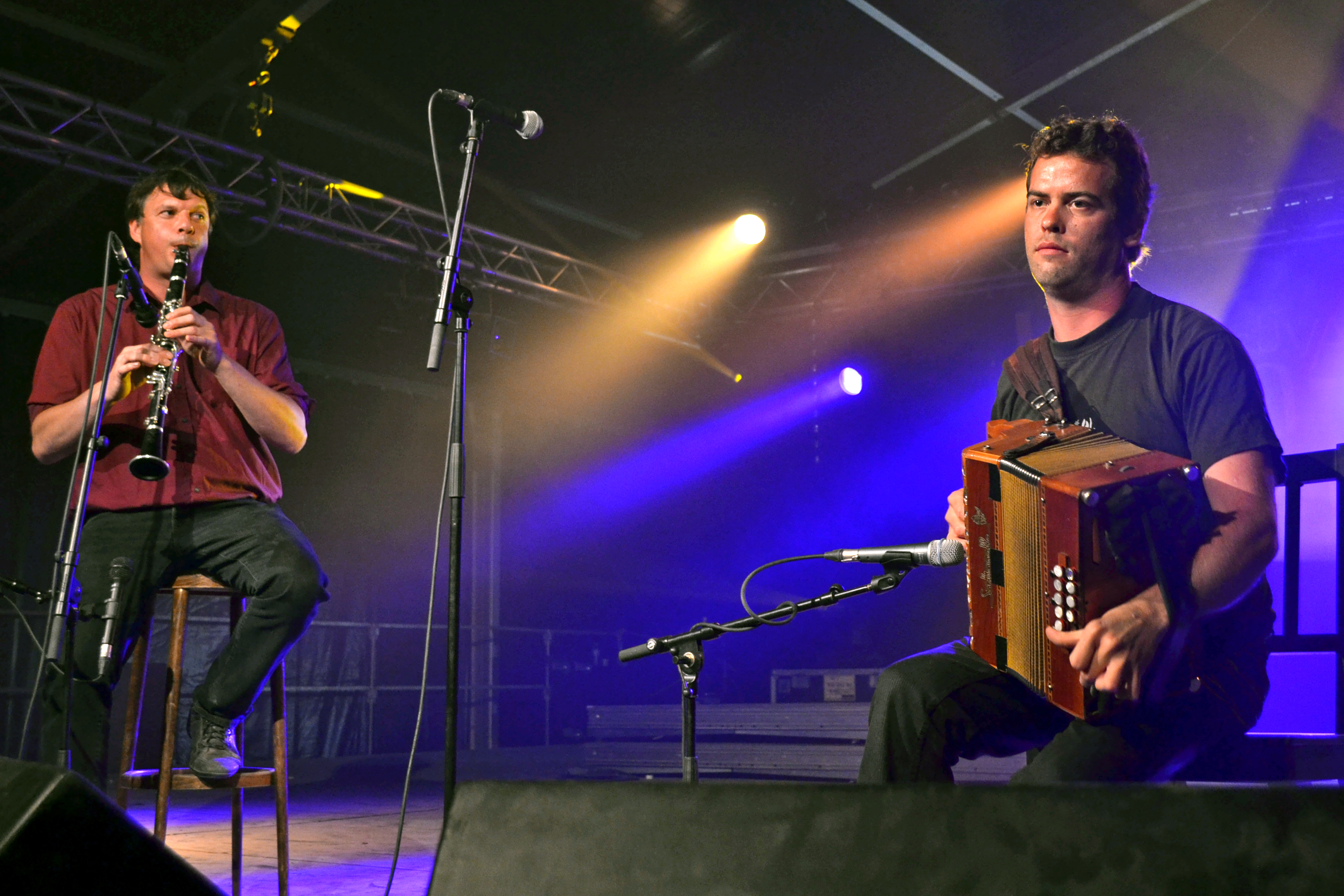 Loig Troël à l'accordéon diatonique et Franck Fagon à la clarinette au fest-noz du festival Kann Al Loar à Landerneau le 13 juillet 2015.